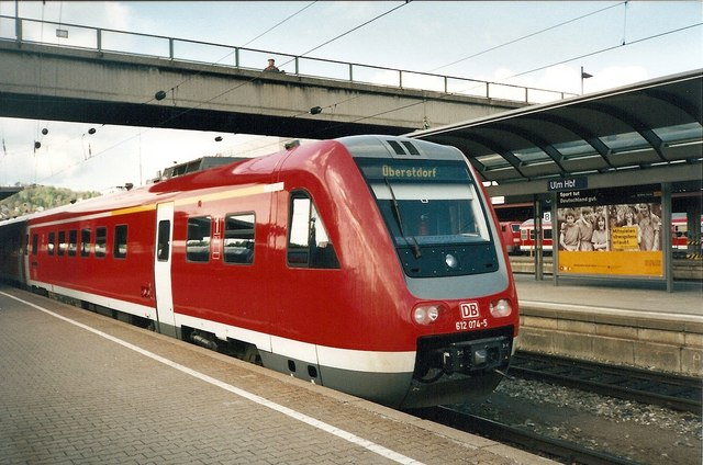 Ulm Hauptbahnhof